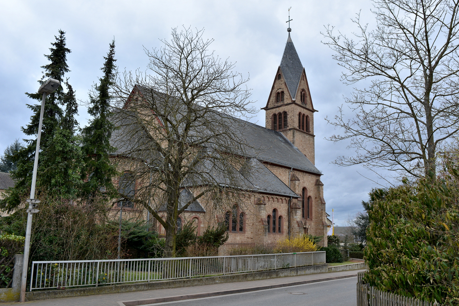 Katholieke parochiekerk St. Gordianus